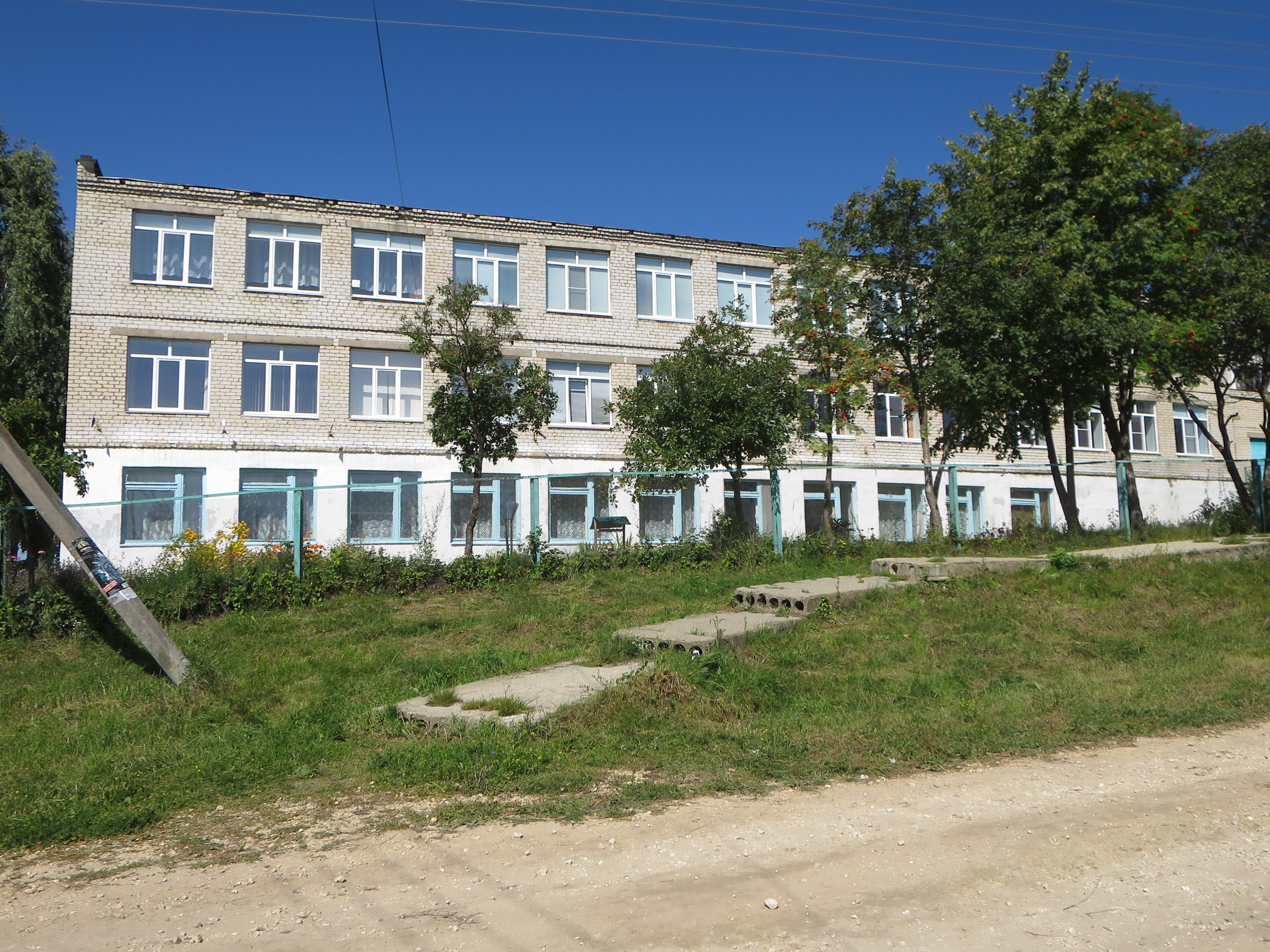 школа в Хватовке Арзамасский район